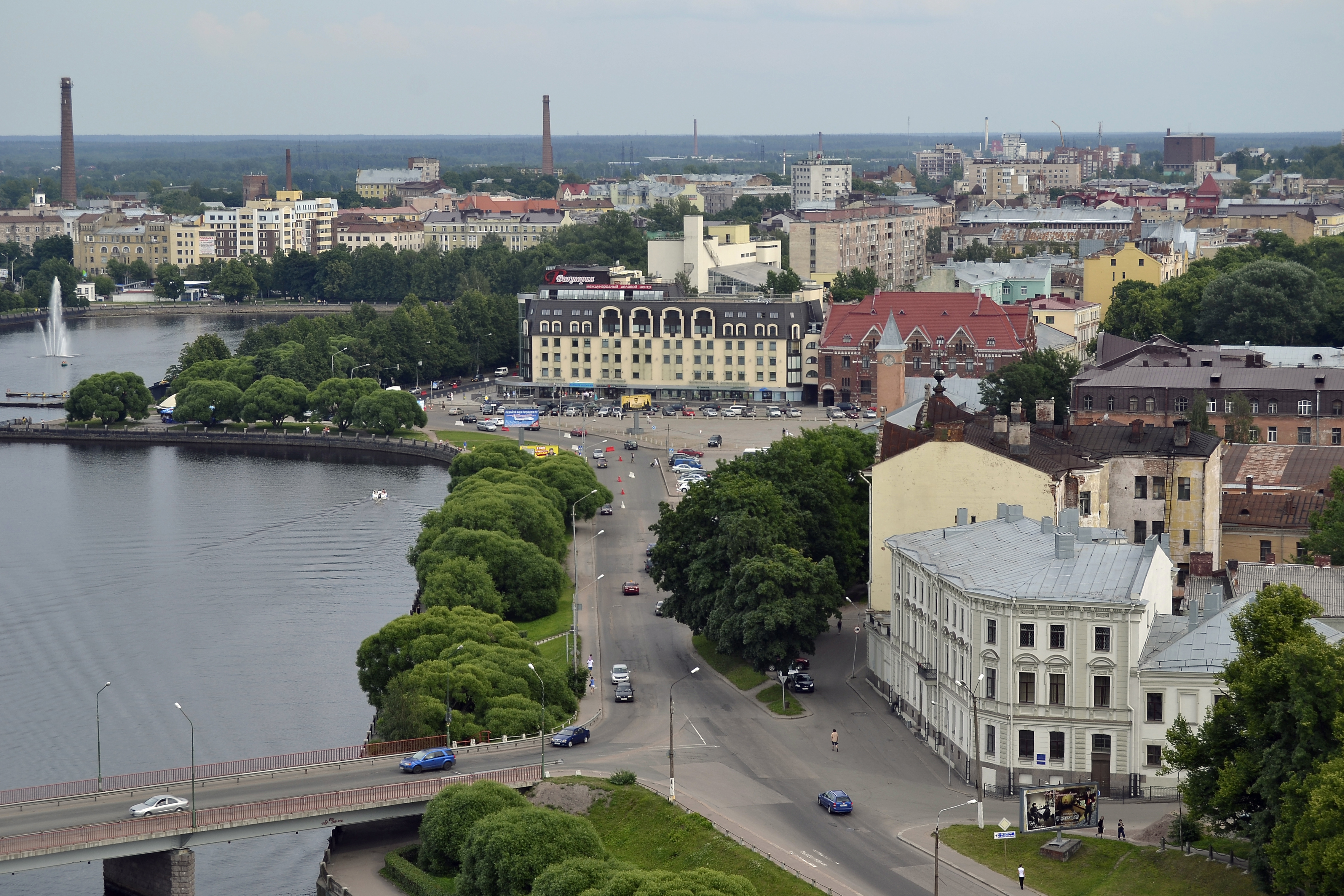 Выборг